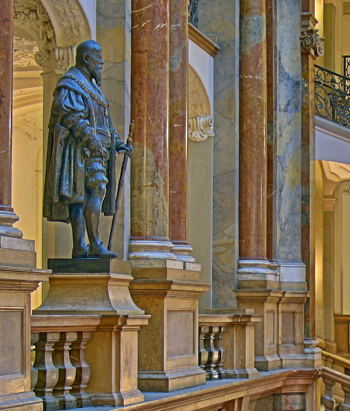 Deutschland, Bayern, München, Justizpalast, Statue Prinregent Luitpold